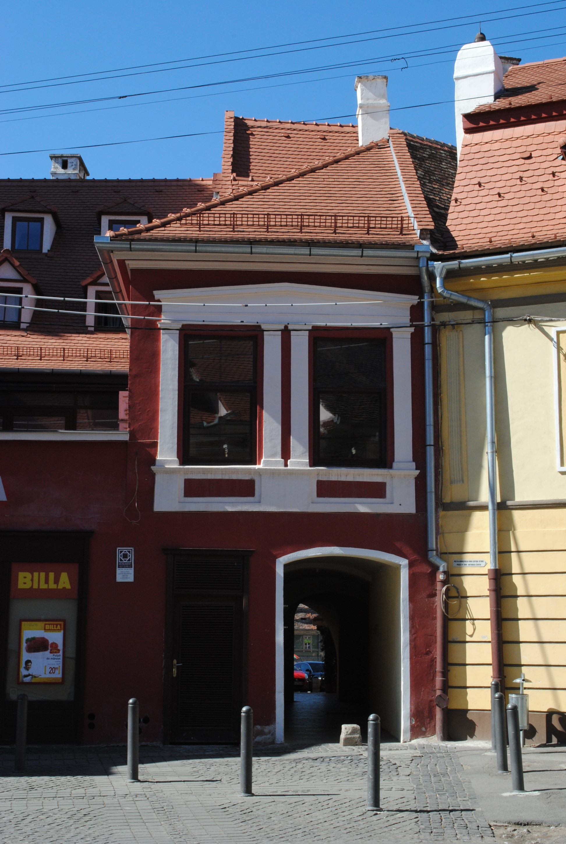 Casă, sec. XV - XVI, sf. sec. XVIII